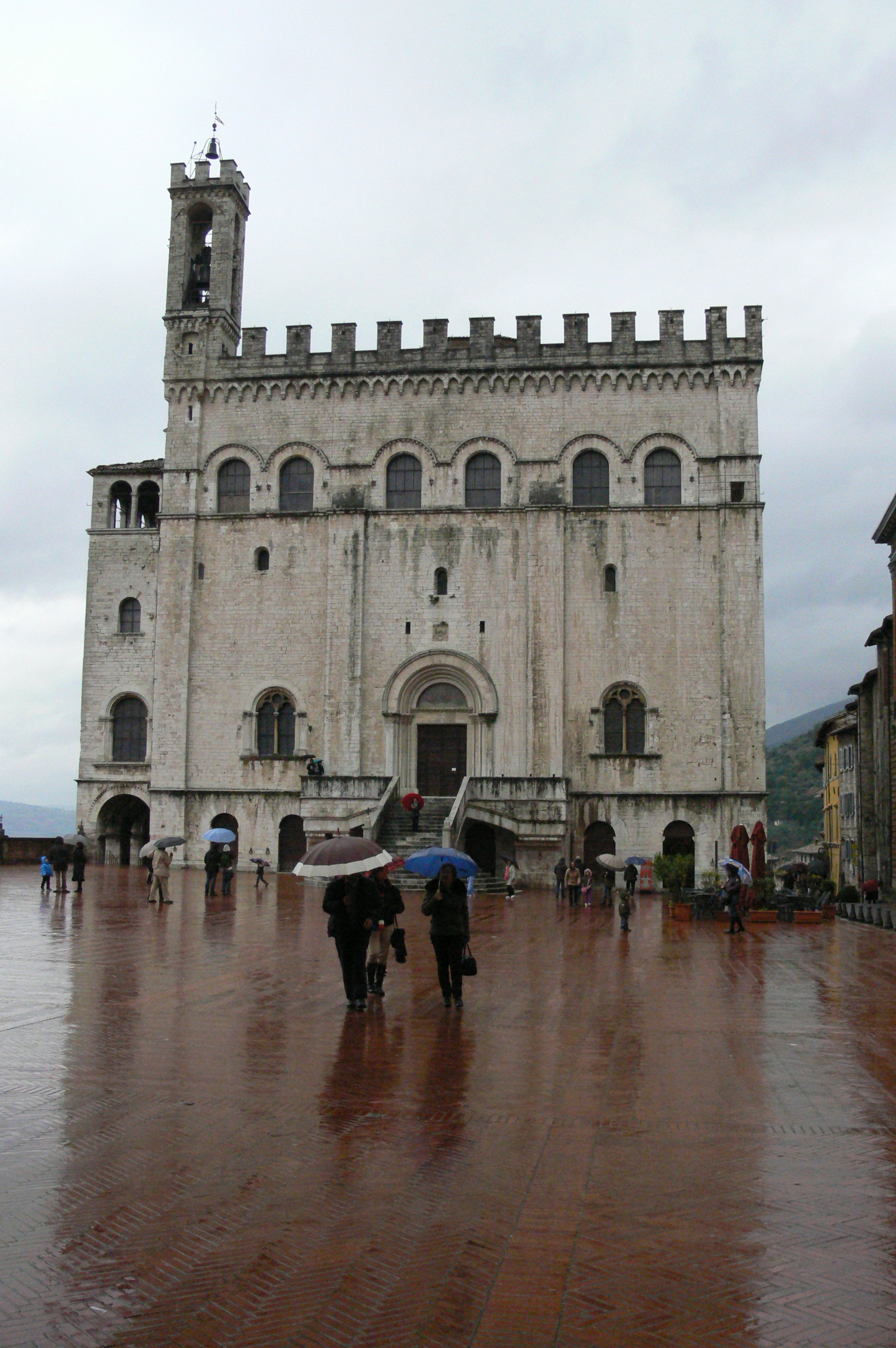 palazzo ducale This is a photo of a monument which is part of cultural heritage of Italy.